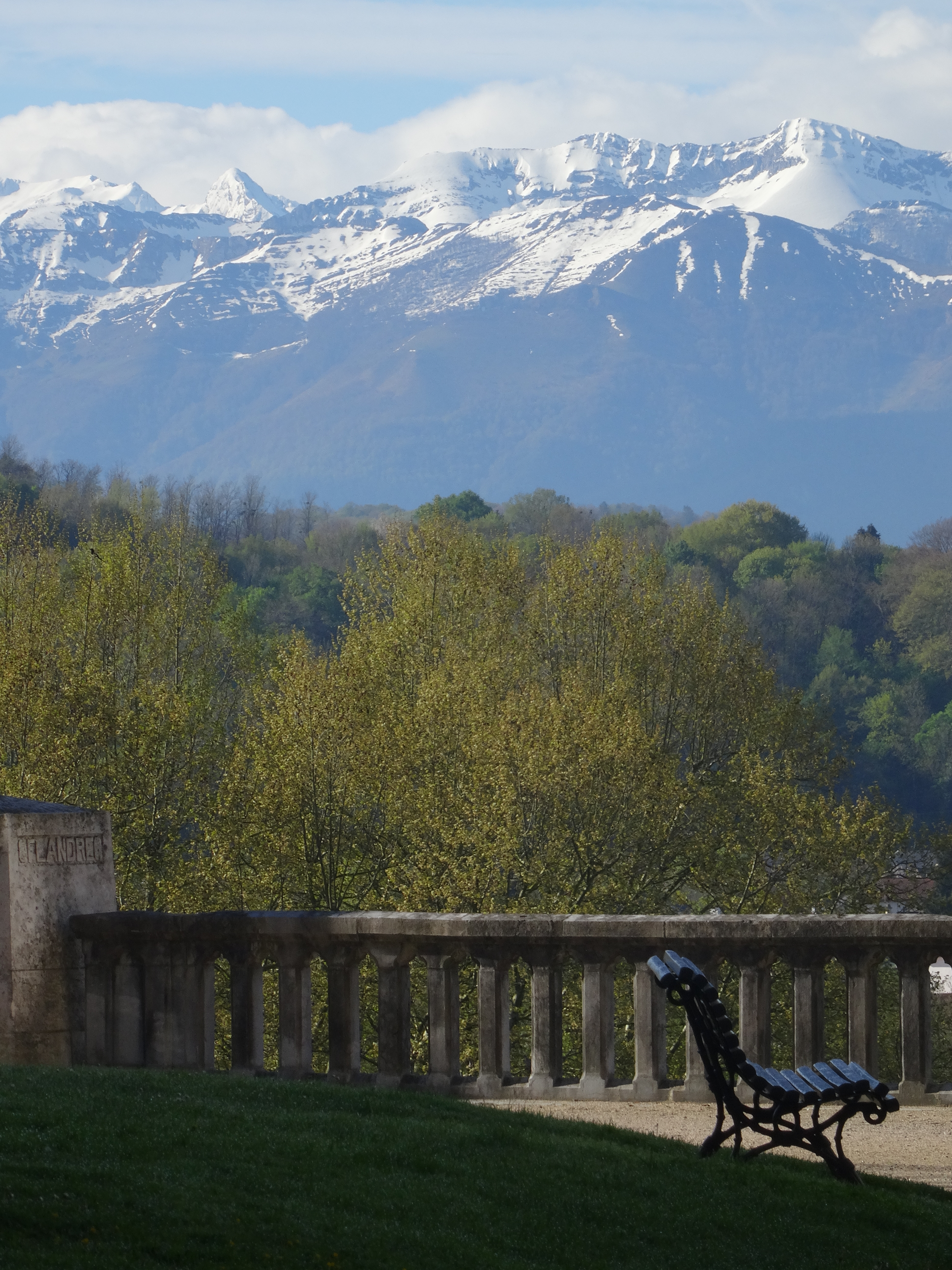 Vue sur les Pyrénées depuis l'église St Martin de Pau